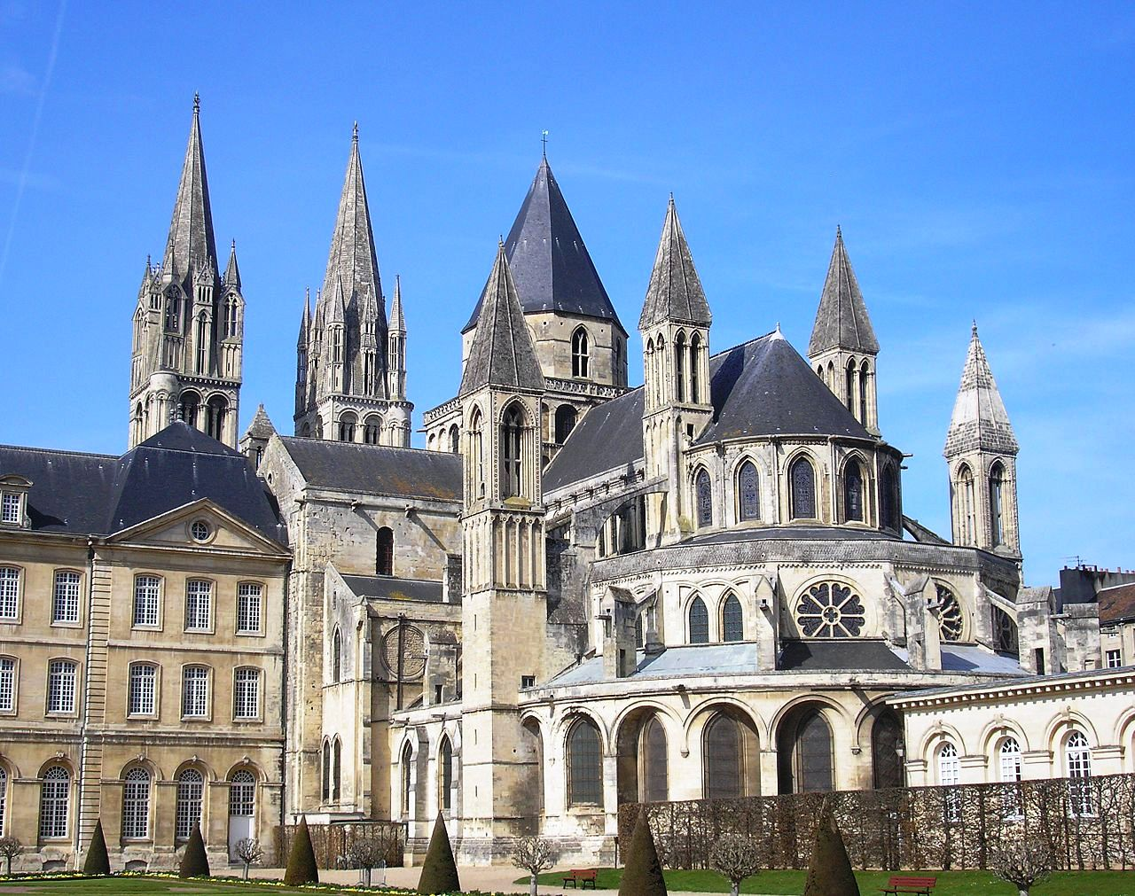 Caen (Normandie, France). L'église abbatiale Saint-Étienne (abbaye aux Hommes), coté chevet.